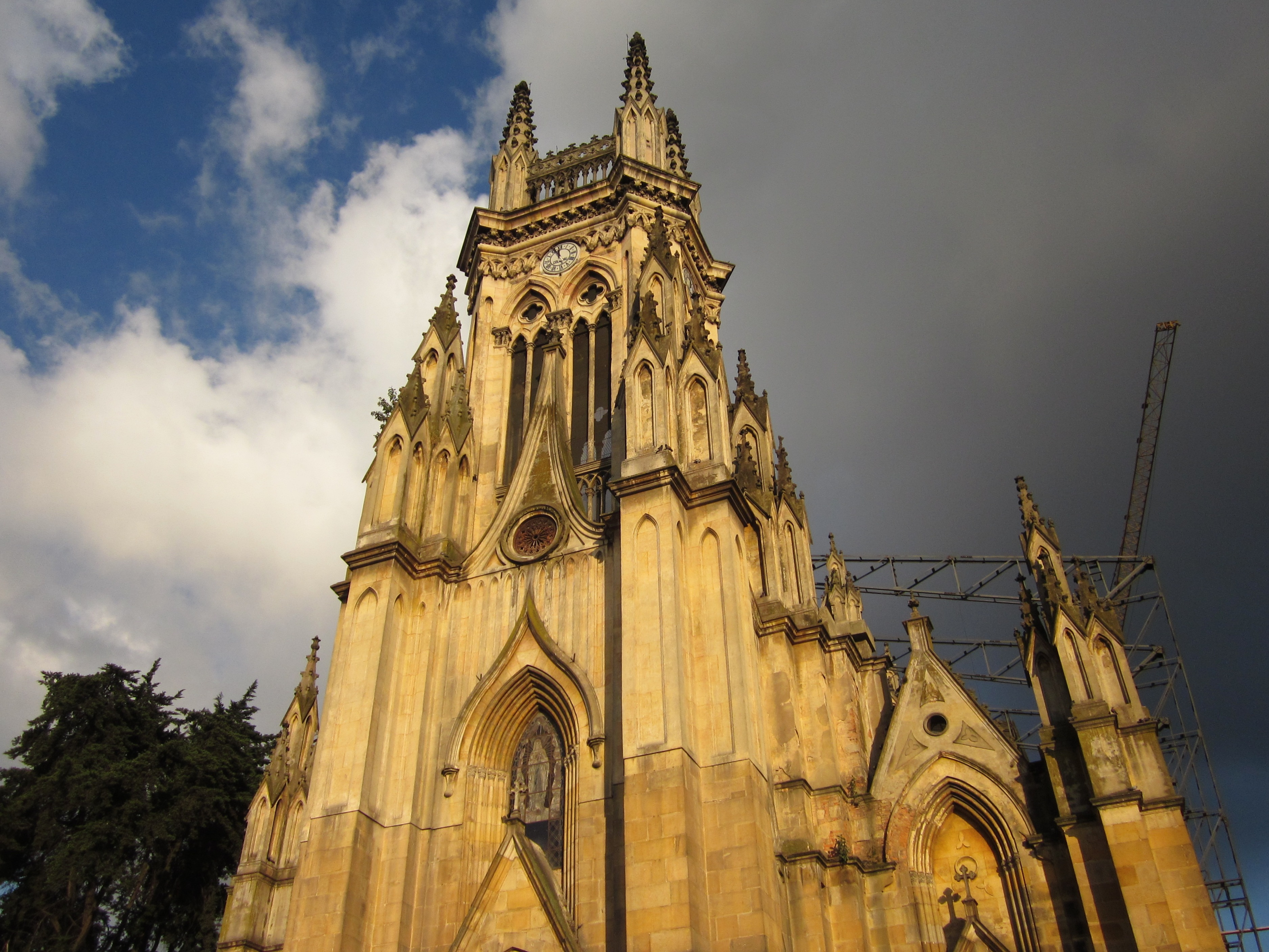 Iglesia de Lourdes en Chapinero, Bogotá.